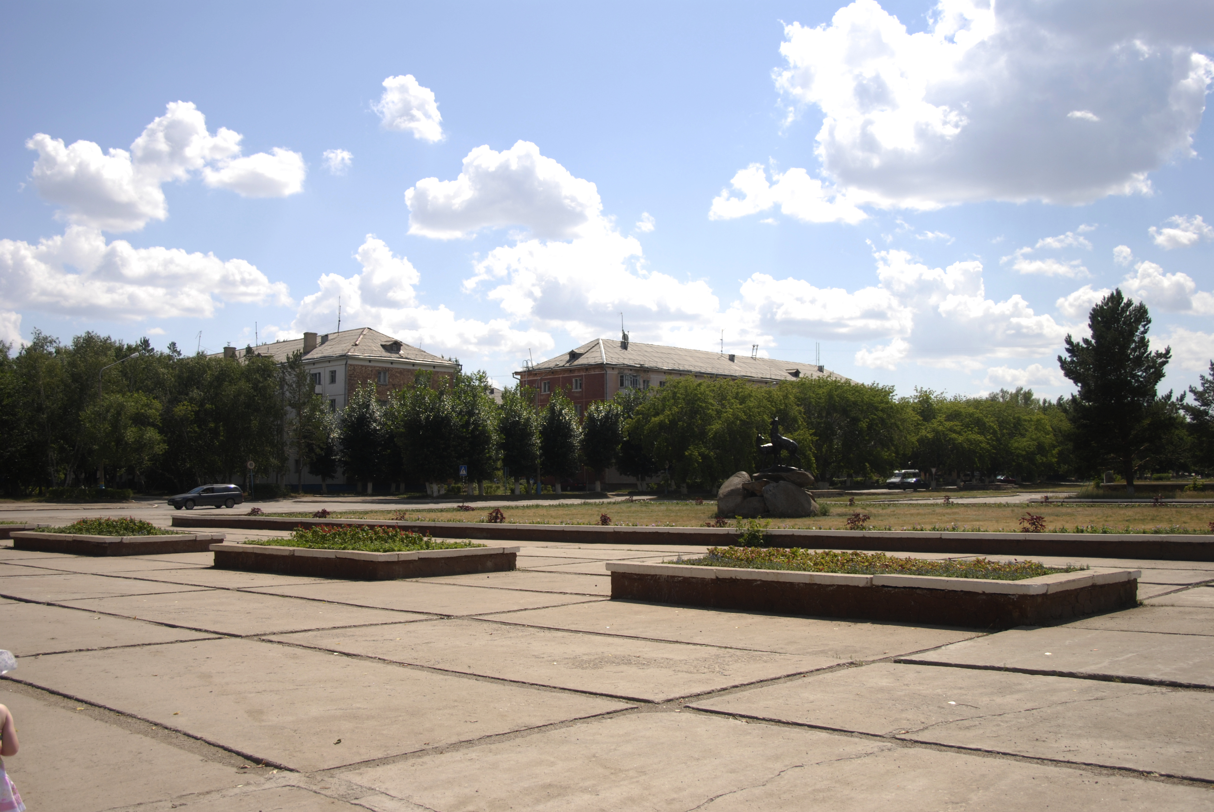 Степногорск, парк